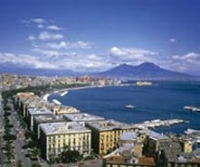 Foto del Golfo di Napoli, Italia. /*foto effettuata dalla terrazza della chiesa di S.Antonio a Posillipo, e poi rimpicciolita*/